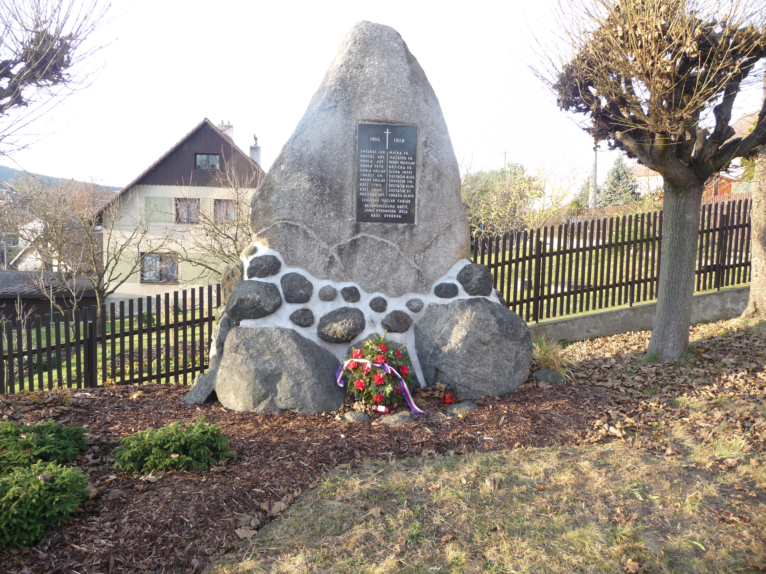 Pomník padlým 1. světové války v Řečici